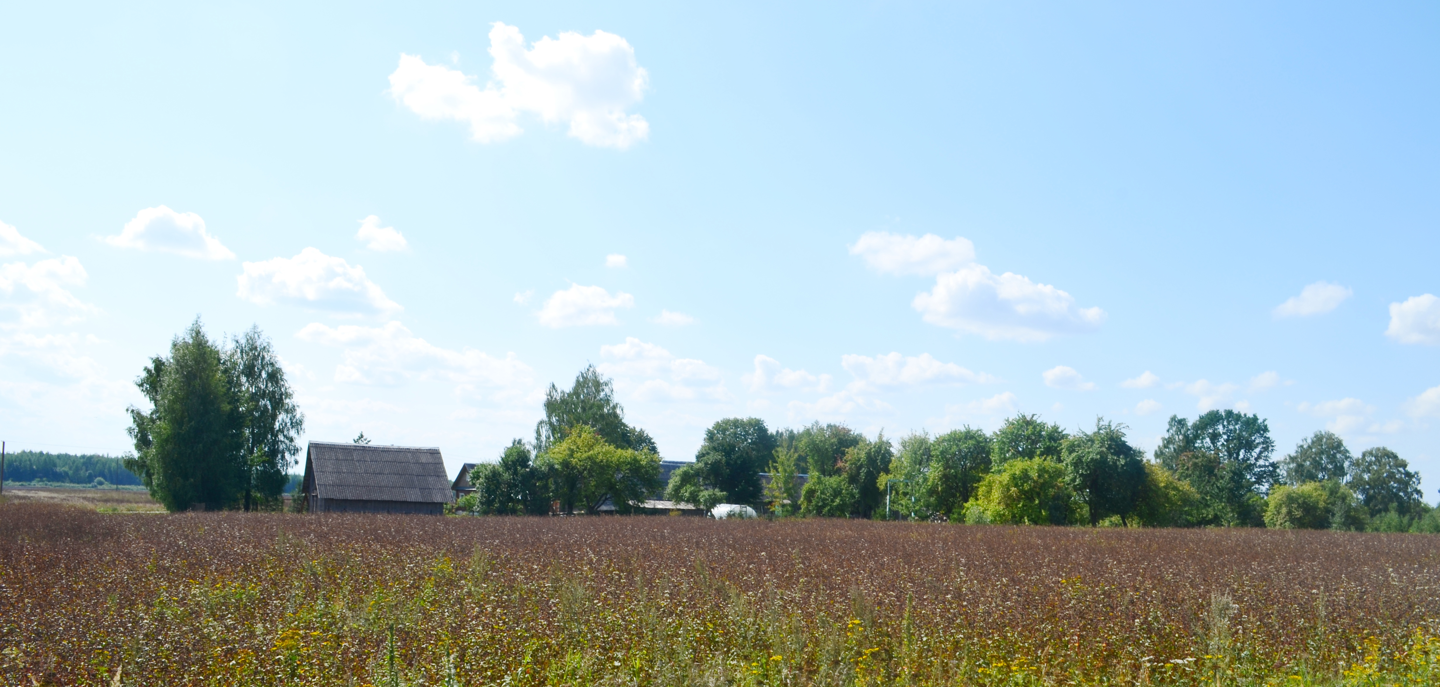 Krakūnai, Šalčininkų raj.